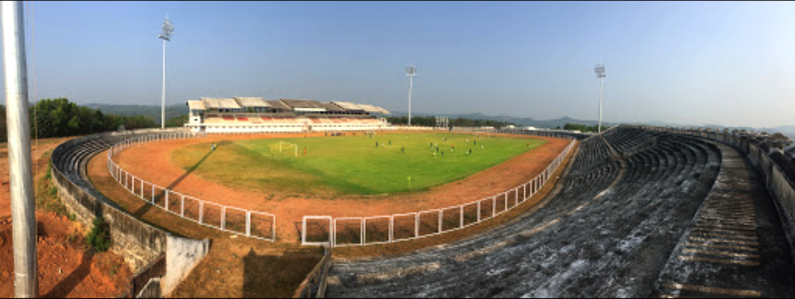 മഞ്ചേരി സ്റ്റേഡിയം കോംപ്ലക്സ്